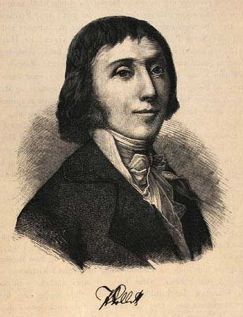 Peter Collett (1767-1823), dansk jurist, godsejer og forfatter